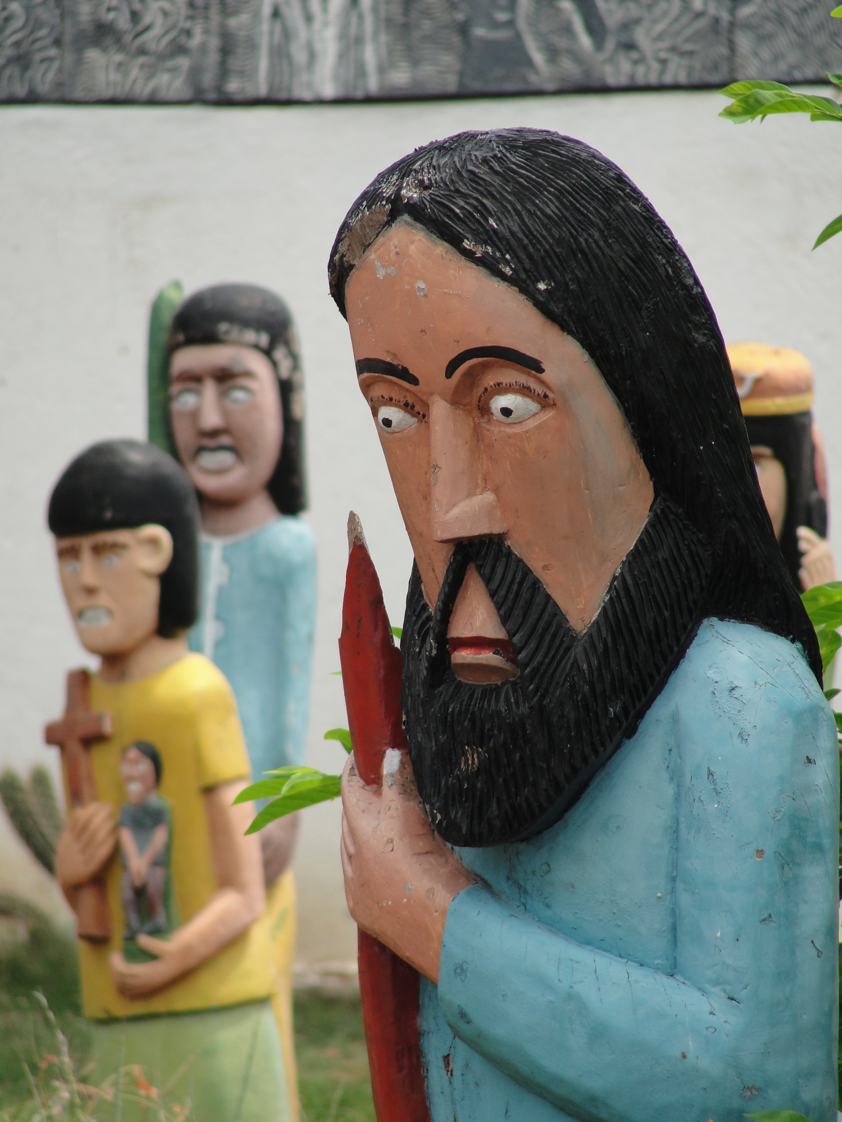 Bonecos que fazem parte do Memorial Antonio Conselheiro